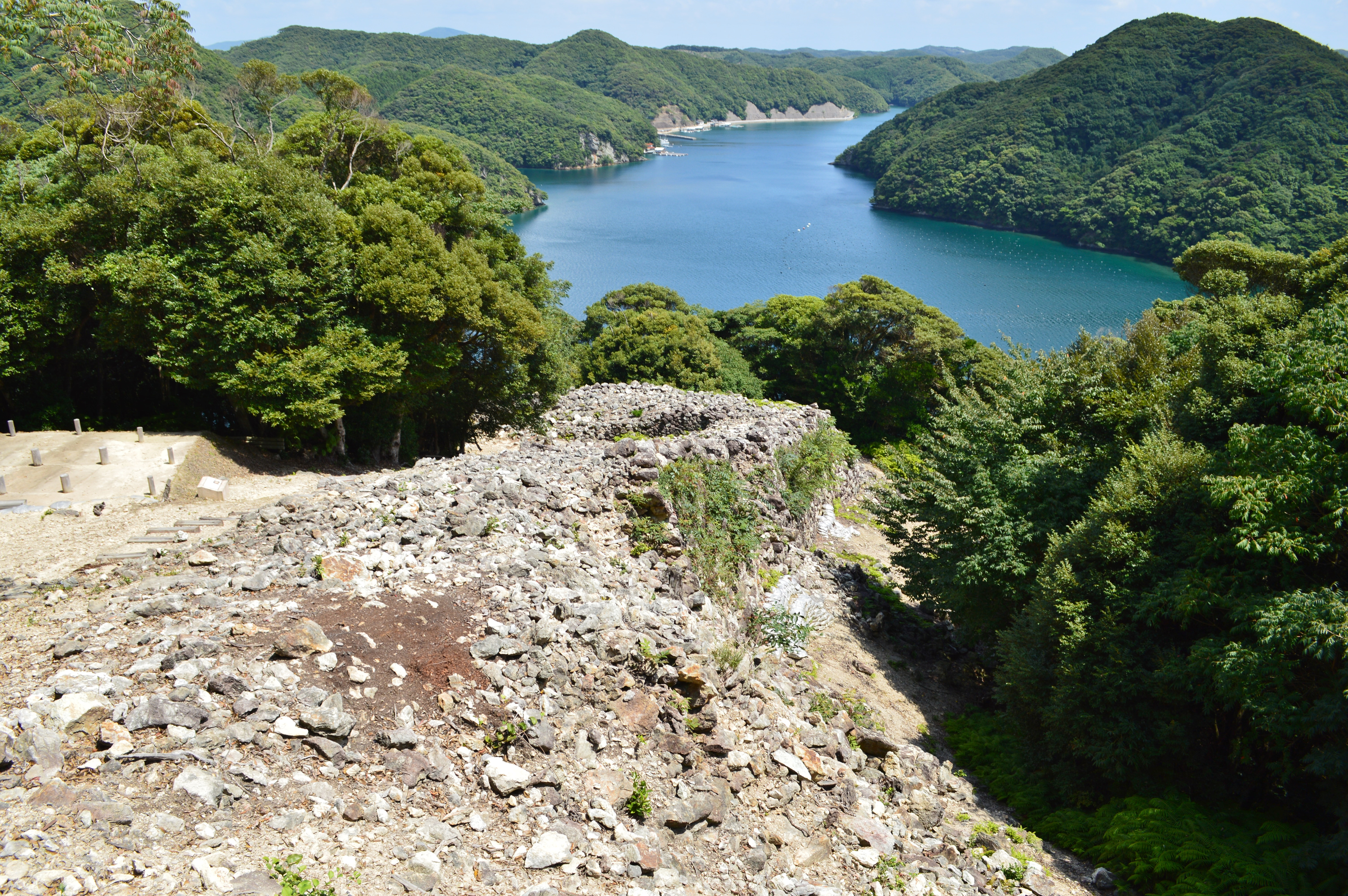 金田城 東南角石塁